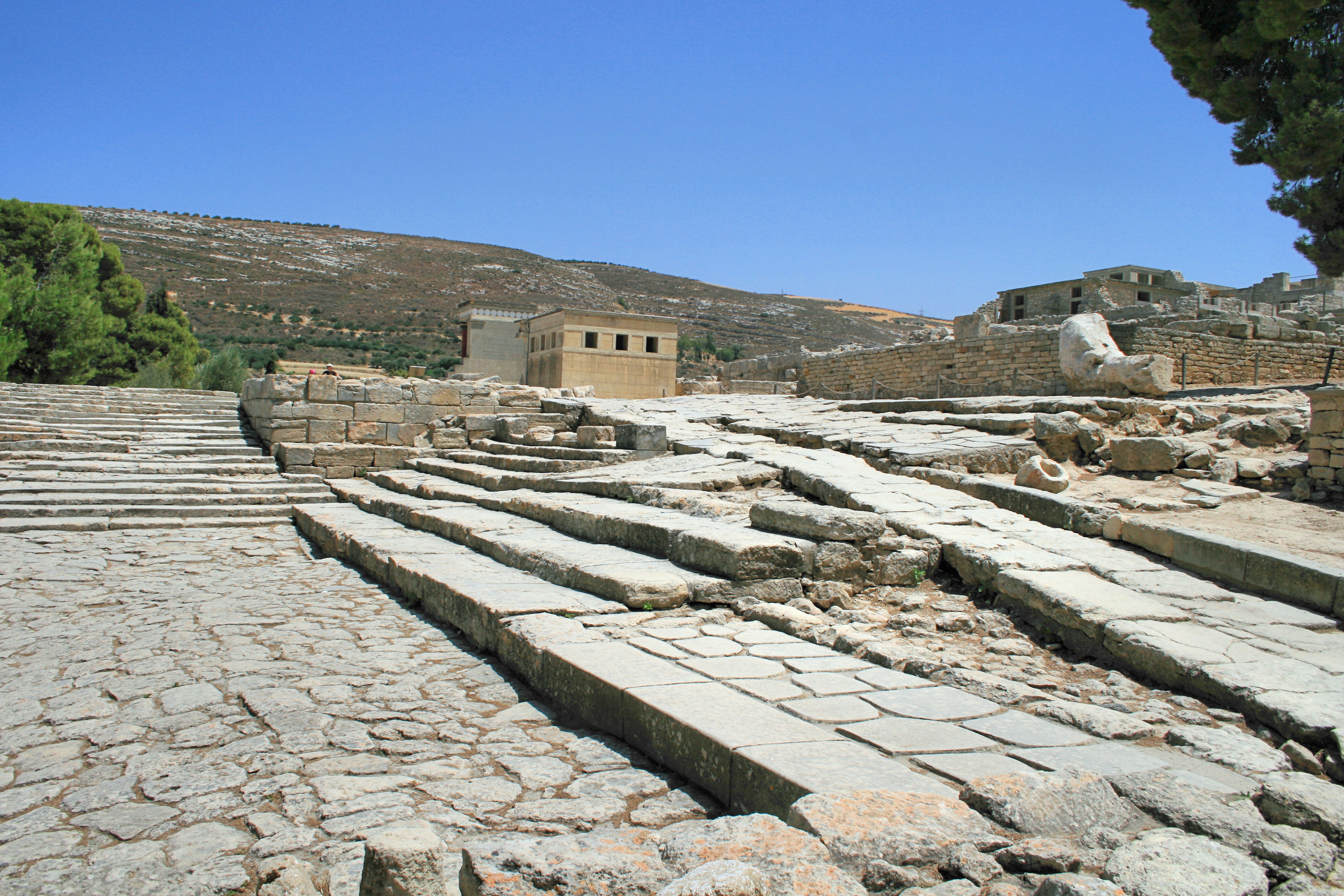 Minoischer Palast von Knossos auf der griechischen Insel Kreta / Teilansicht des „Theaters“ (die Stufen im Vordergrund)